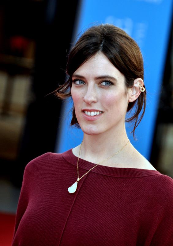 Rebecca Thomas au festival du film américain de Deauville